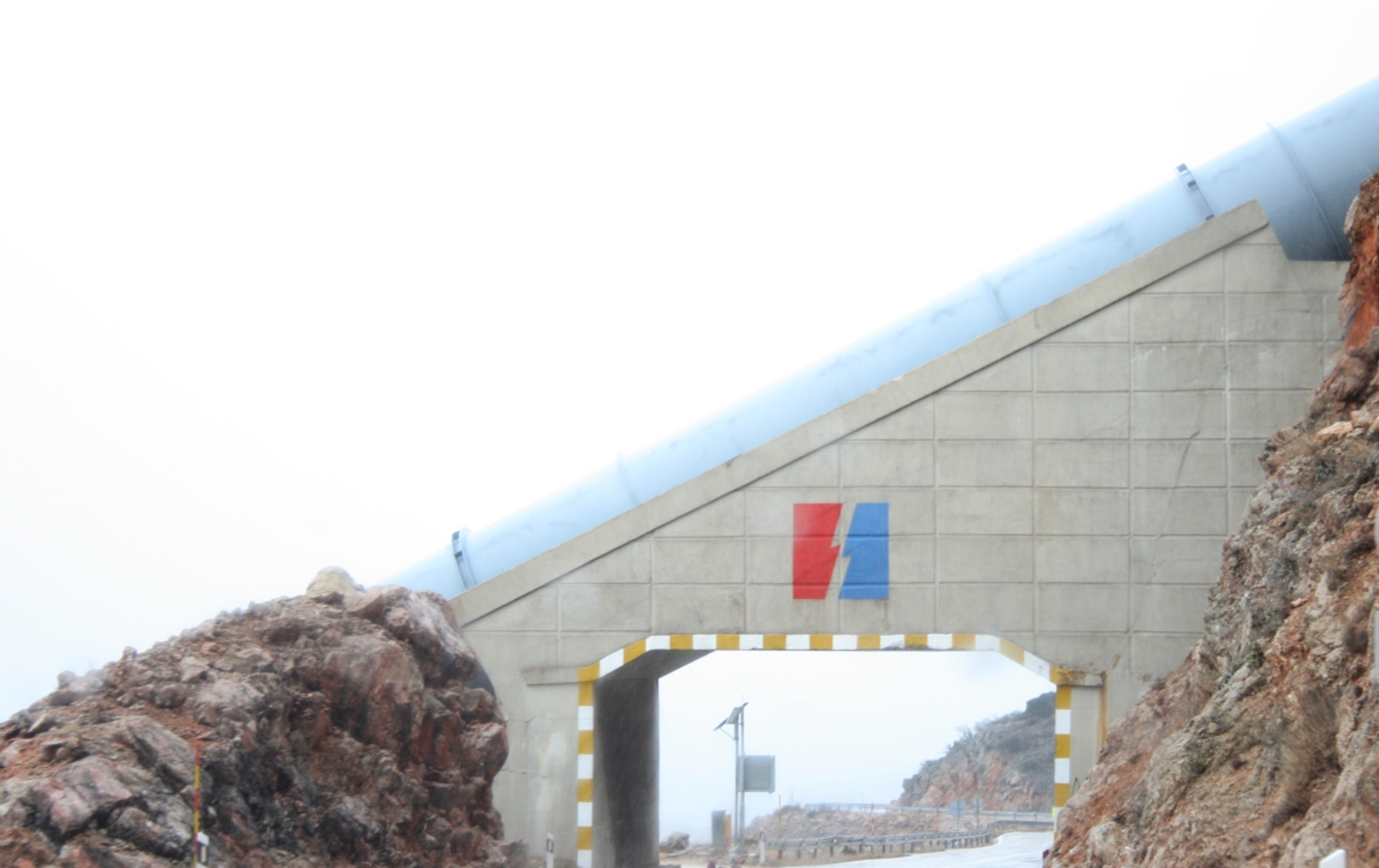 D 27 near Obrovac